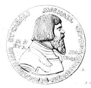 Medaille auf Michel Ott